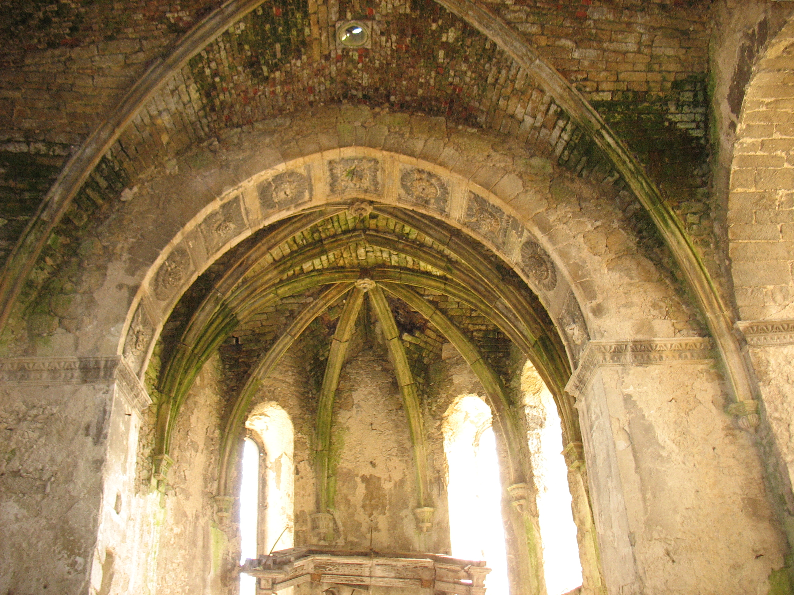 Костел Внебовзяття Діви Марії (мур.), село Біще